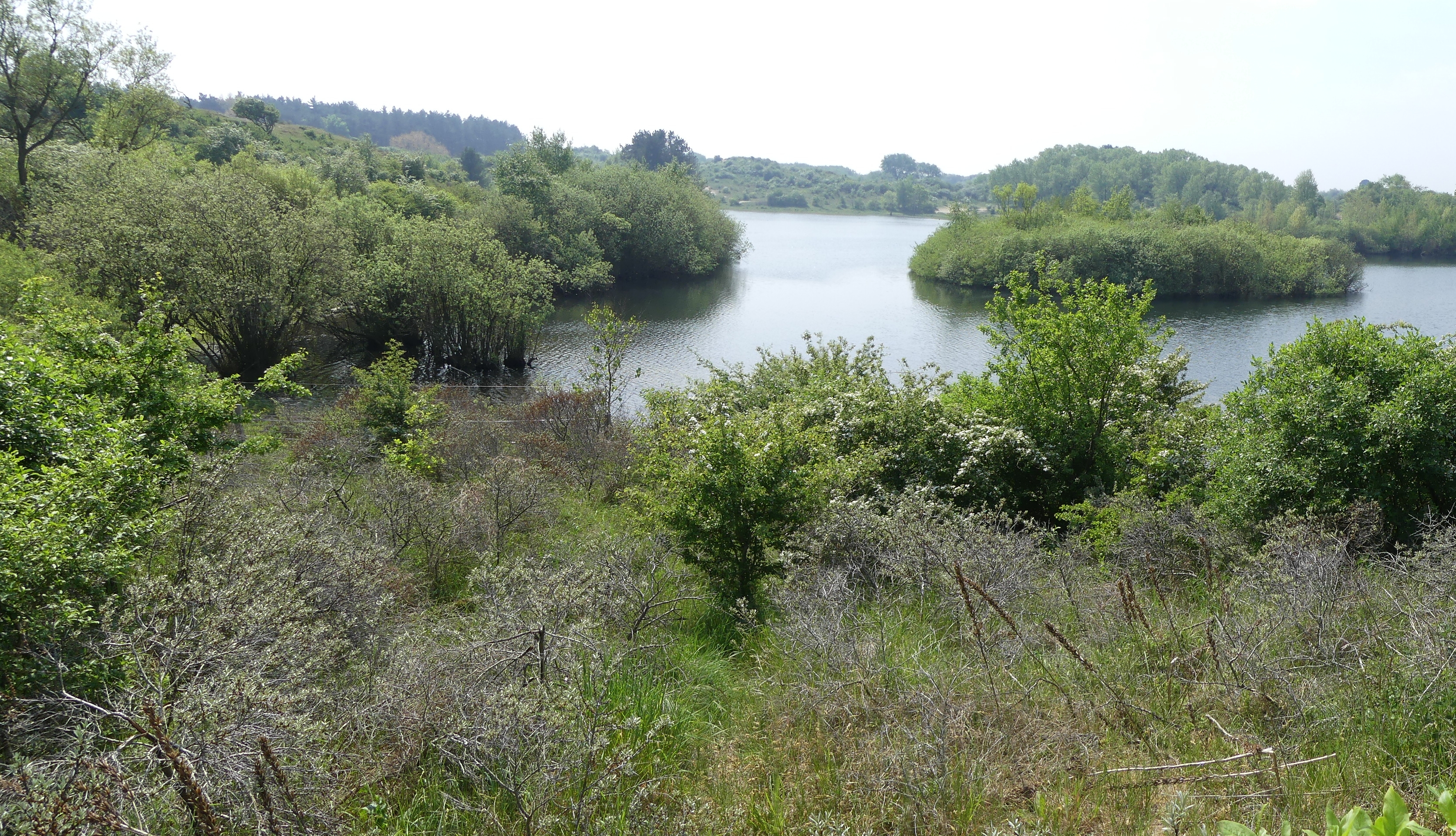 Wisentenuitkijkpunt nabij meertje van Burdet in Zuid-Kennemerland